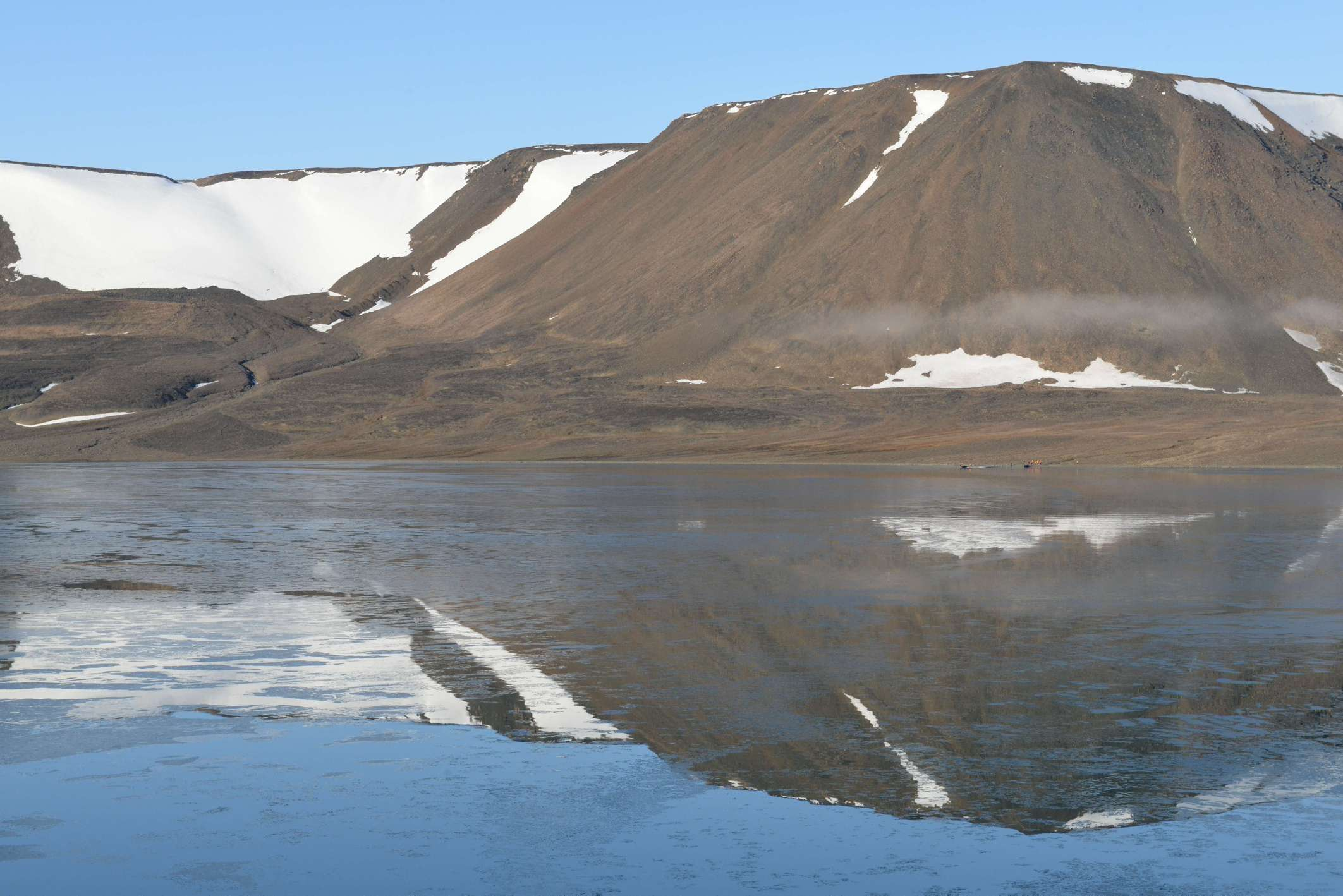 Fjord der Bolschewik-Insel (Russland)